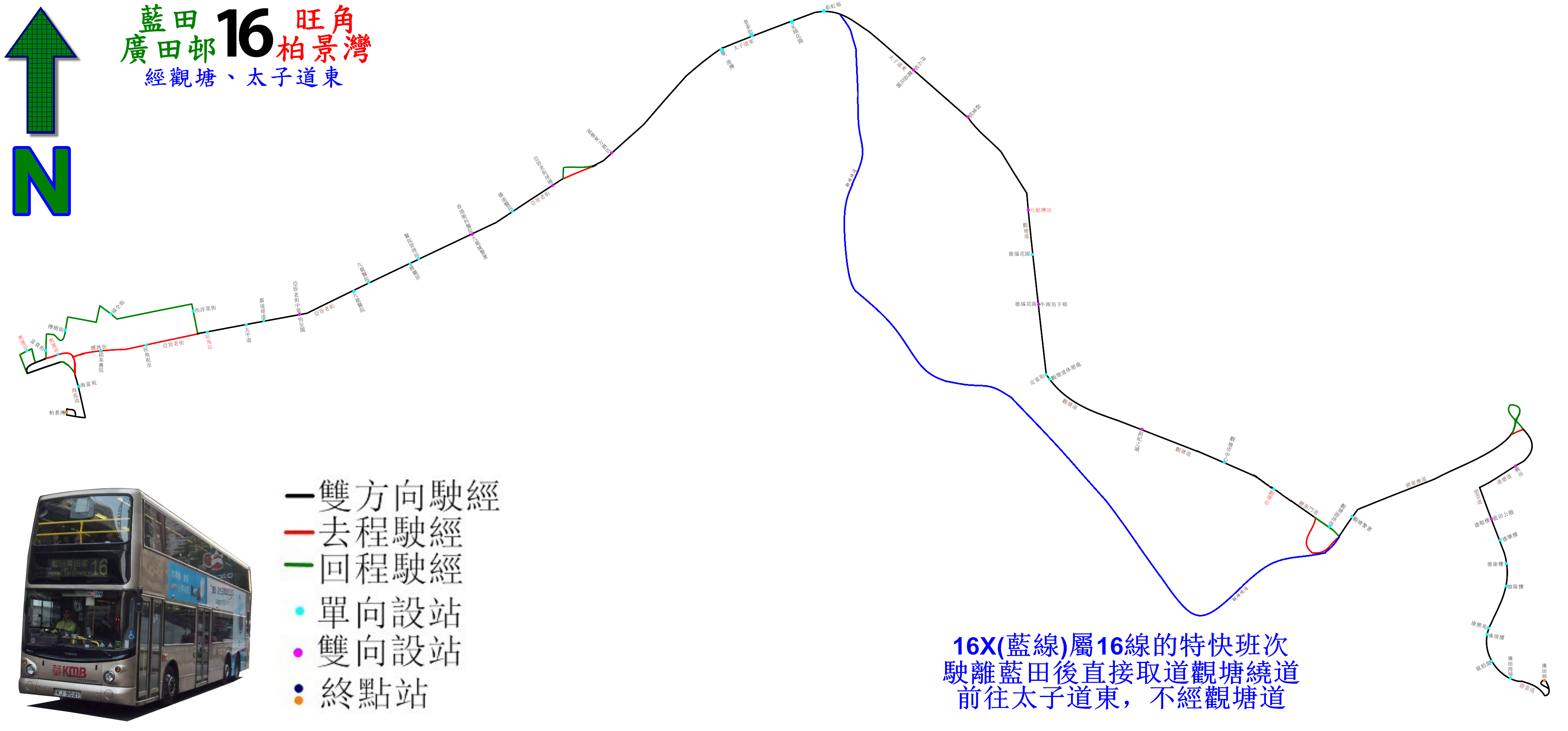 中文（香港）: 九巴16號線的走線圖